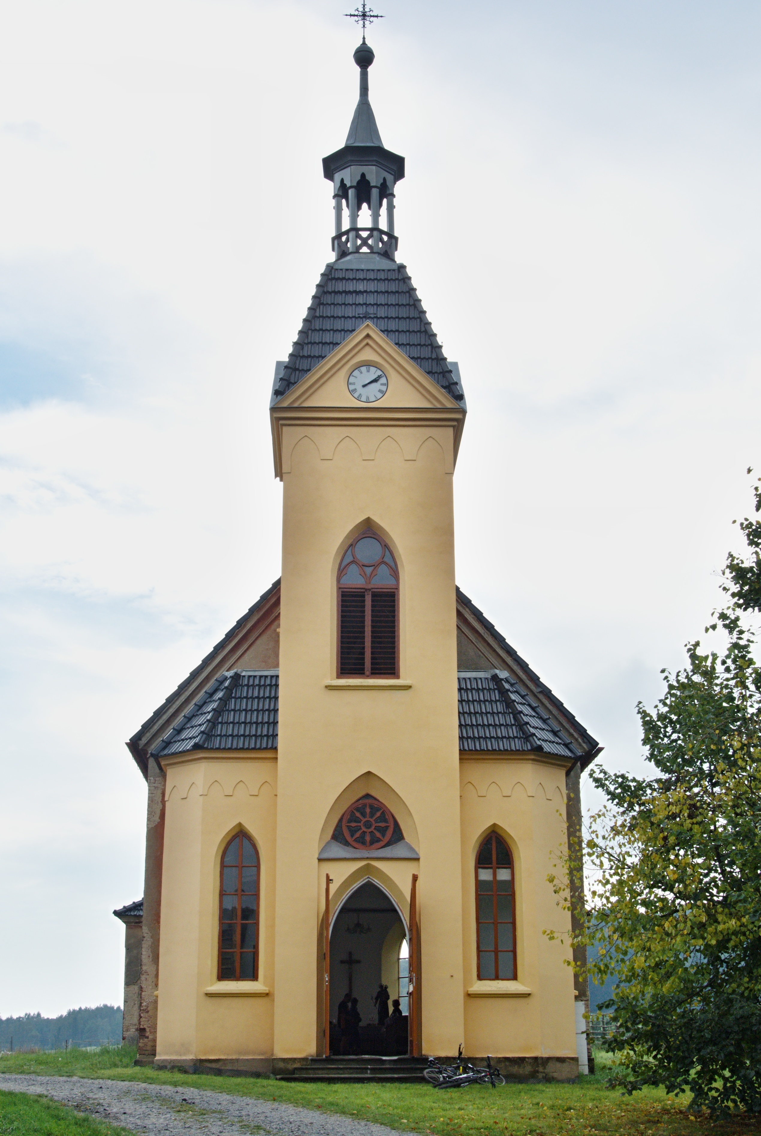 Kaple svatého Antonína, střed vsi, Heřmanice v Podještědí.